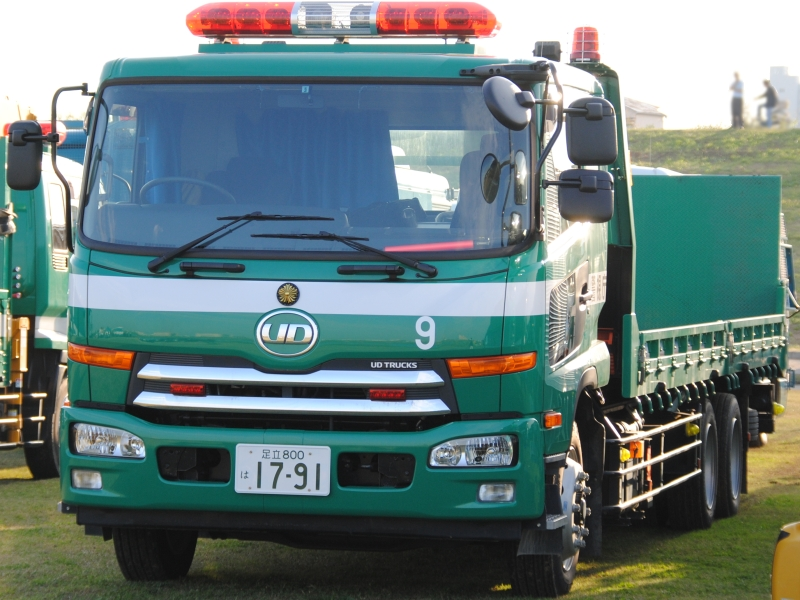 警視庁の重機搬送車